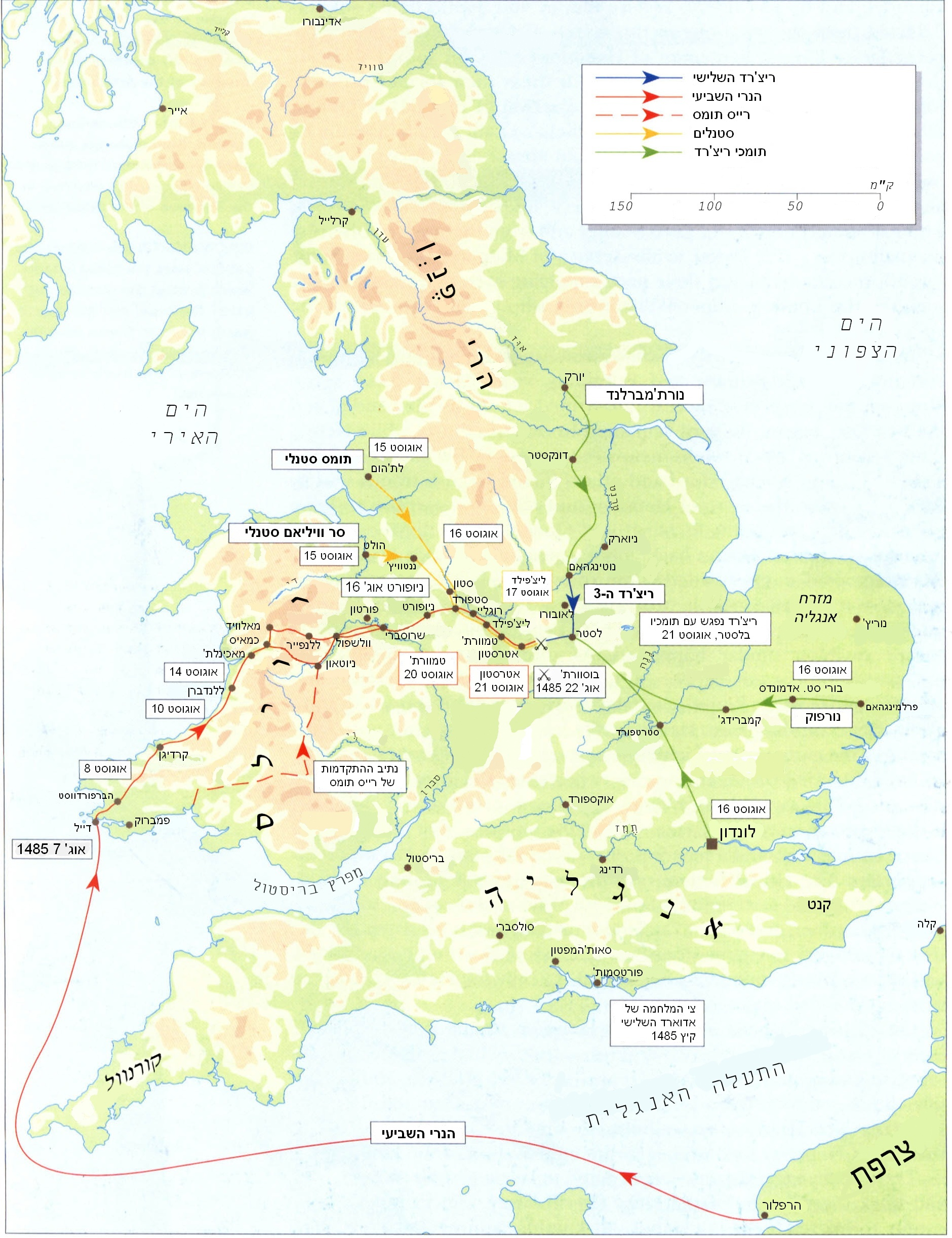 הפלישה של הנרי השביעי לאנגליה, עד קרב בוסוורת'.